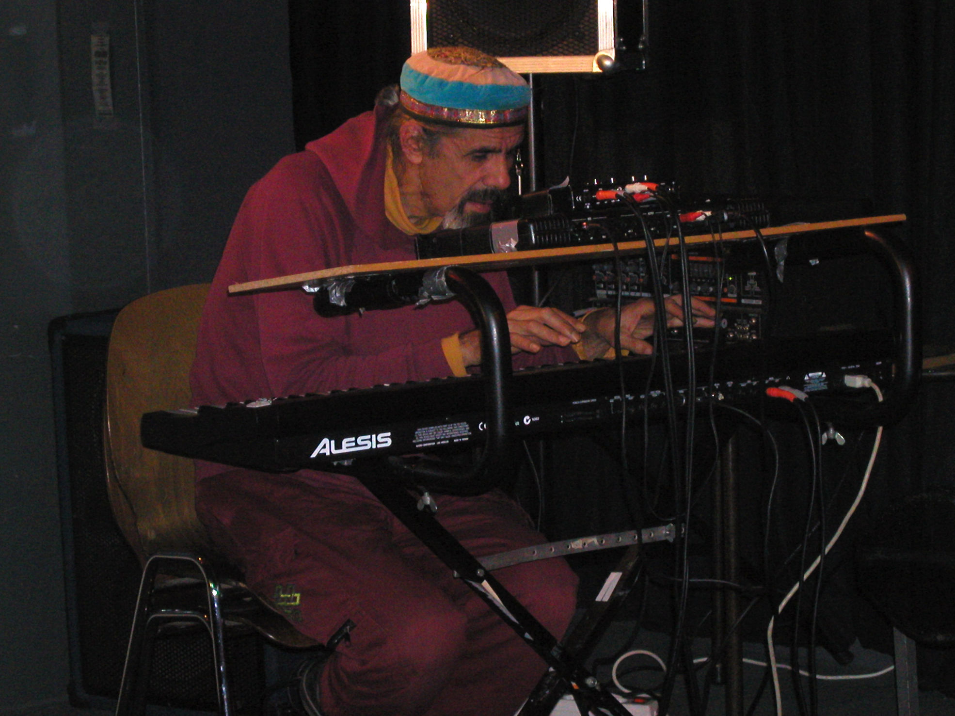 Alan Silva (Jazzbassist und Synthesizerspieler) mit dem Tradition Trio im Club W71 in Weikersheim